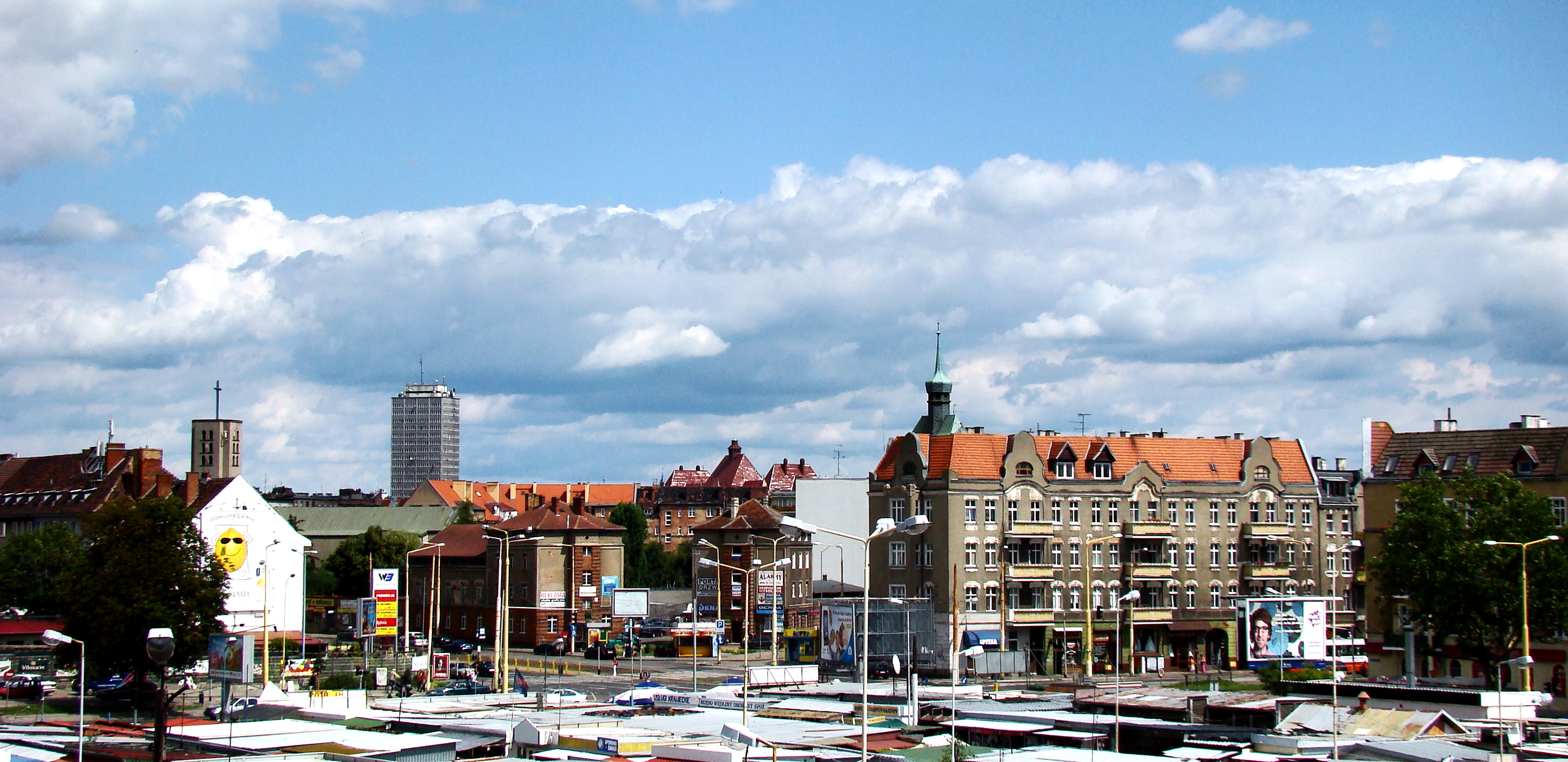 Szczecin-Turzyn, Polska